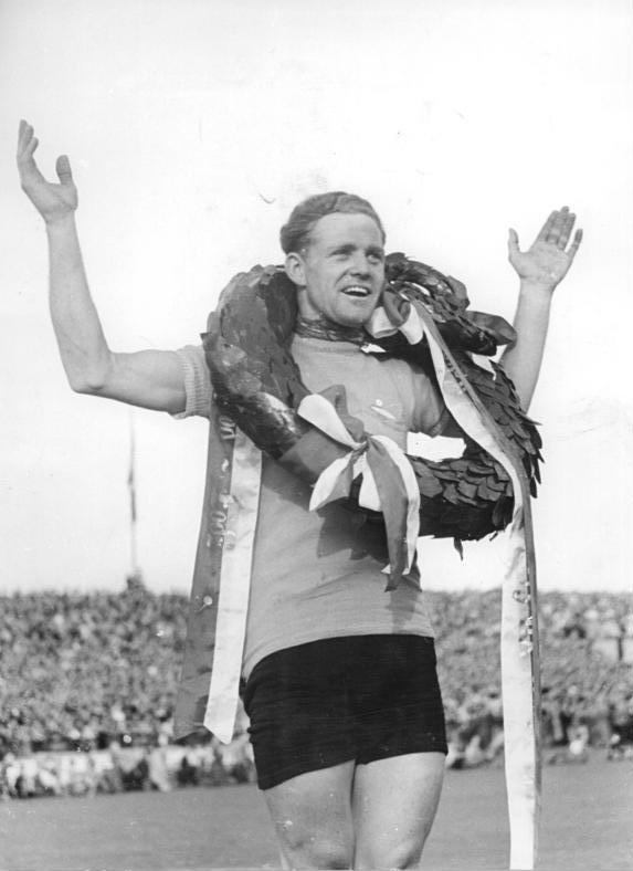 VIII. Friedensfahrt, Gustav-Adolf Schur Zentralbild Kronfeld Bey-Ho 16.5.1955 VIII. Internationale Radfernfahrt Prag-Berlin-Warschau - Stalinograd - Lodz über 205 km. UBz: Den zweiten diesjährigen Etappensieg schaffte unser "Meister des Sports" Schur (DDR), der in Lodz begeistert gefeiert wurde.